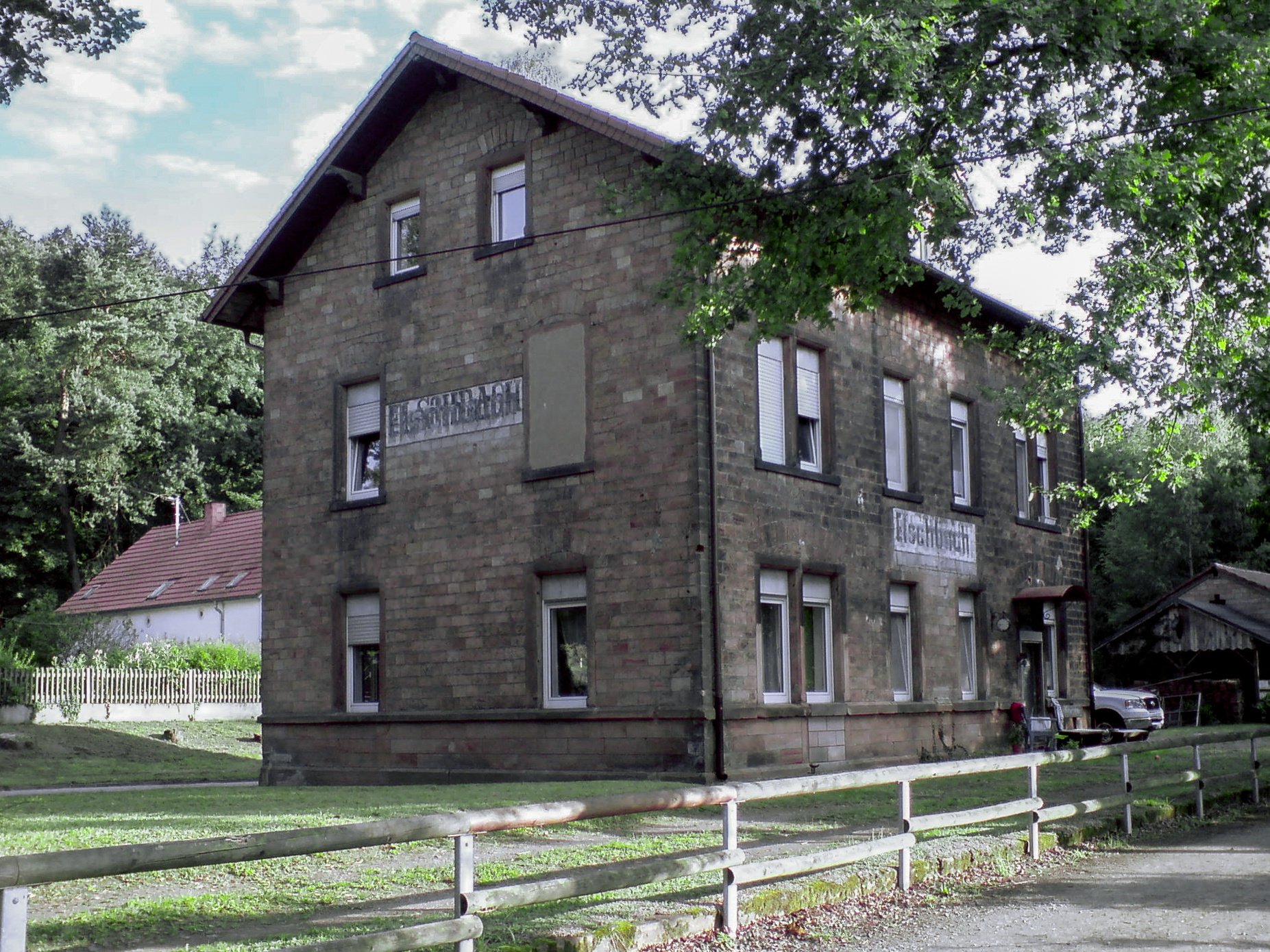 Bahnhof Elschbach mit Nebengebäude